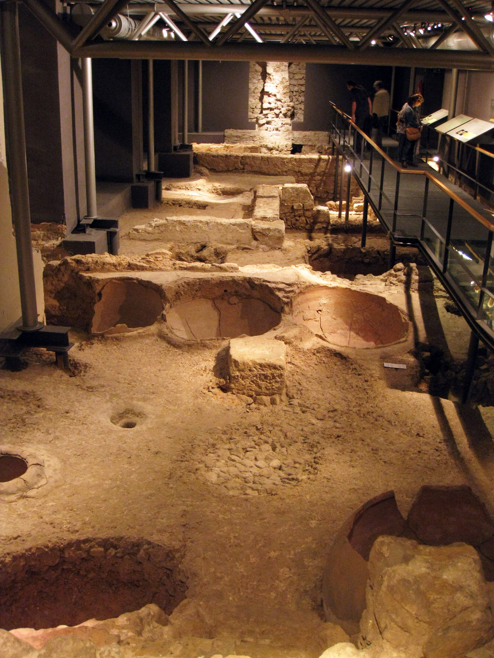 Museu_d'Història_de_la_Ciutat,_ruïnes_romanes_del_subsòl (Barcelona)